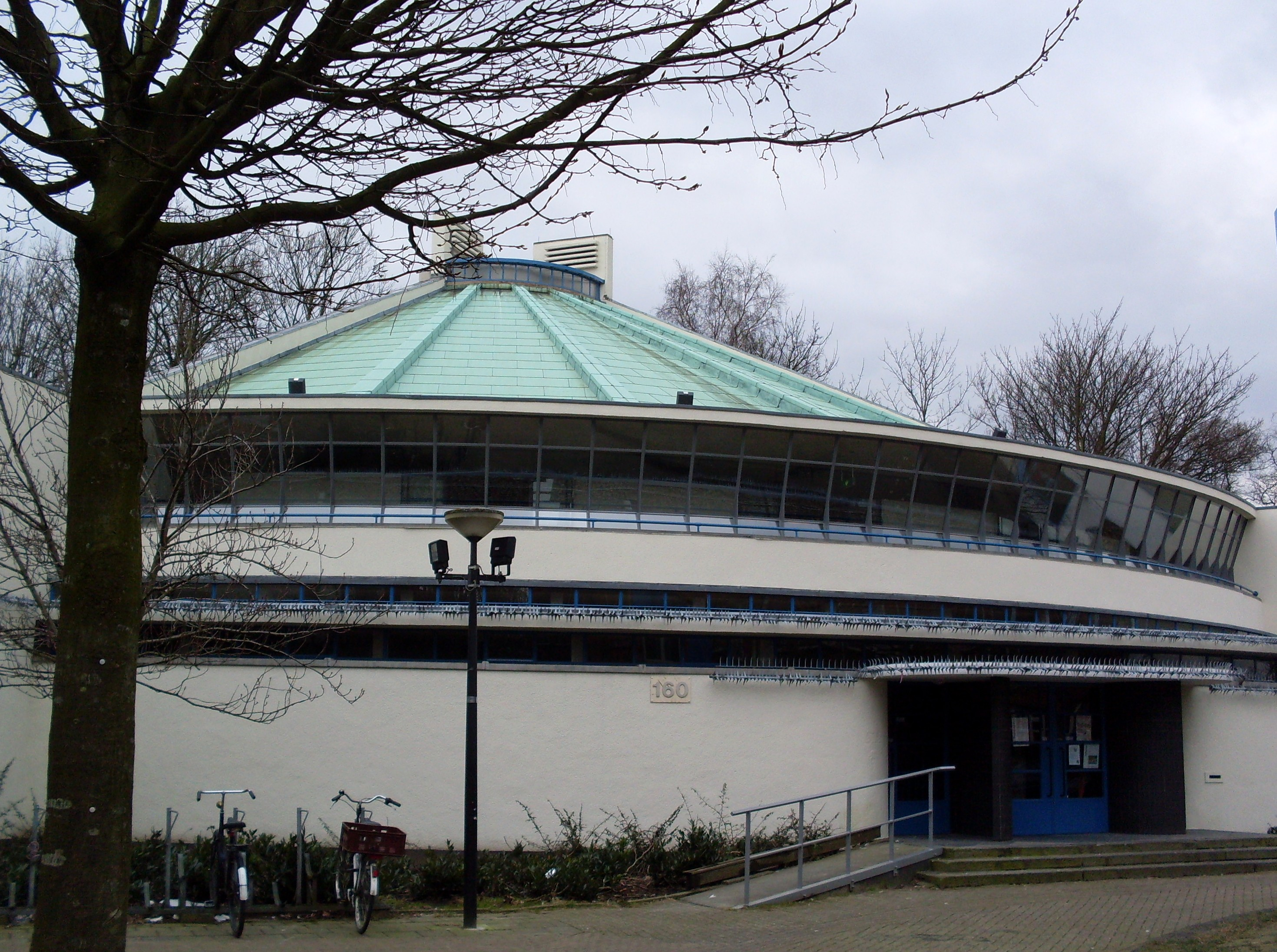 Tolstraat 160